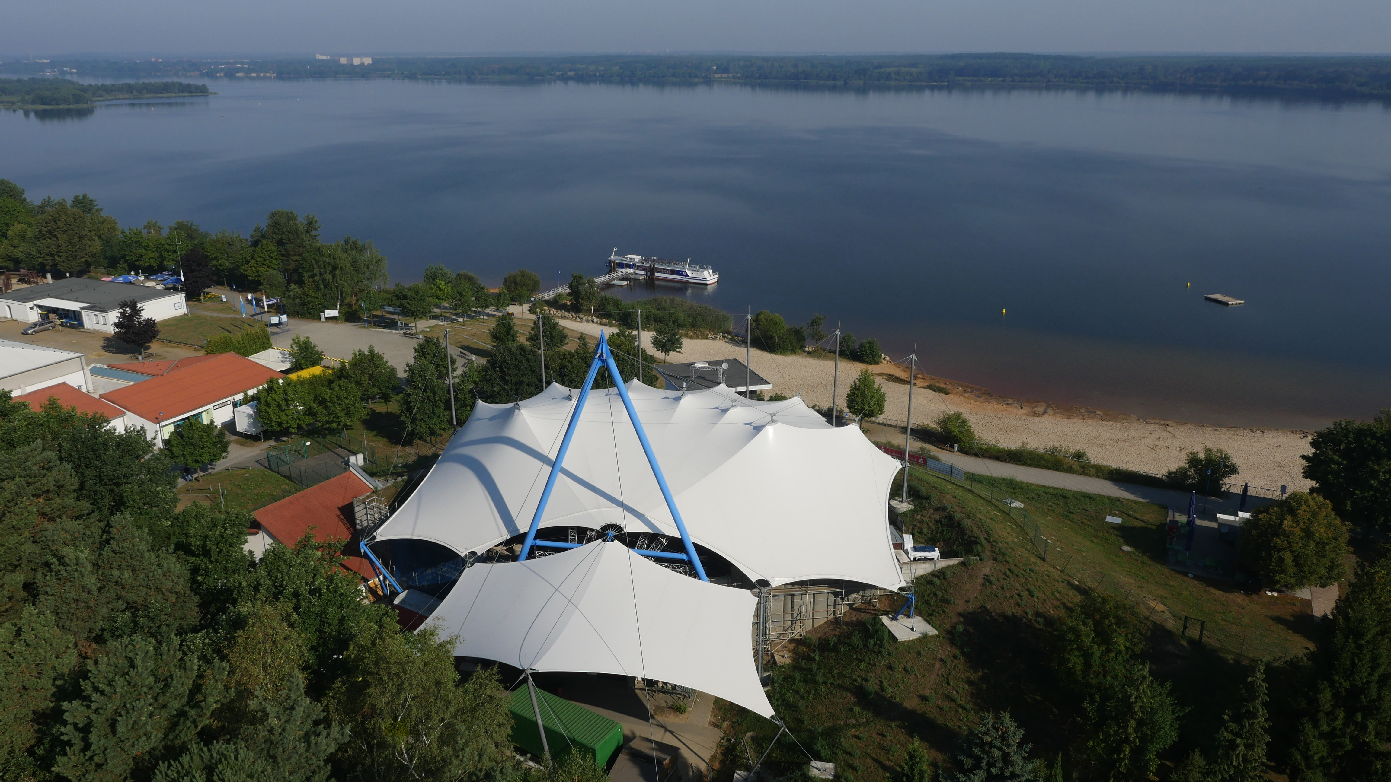 Das Amphitheater - die Sommeraußenspielstätte der neuen Bühne Senftenberg am Senftenberger See, Foto: Steffen Rasche